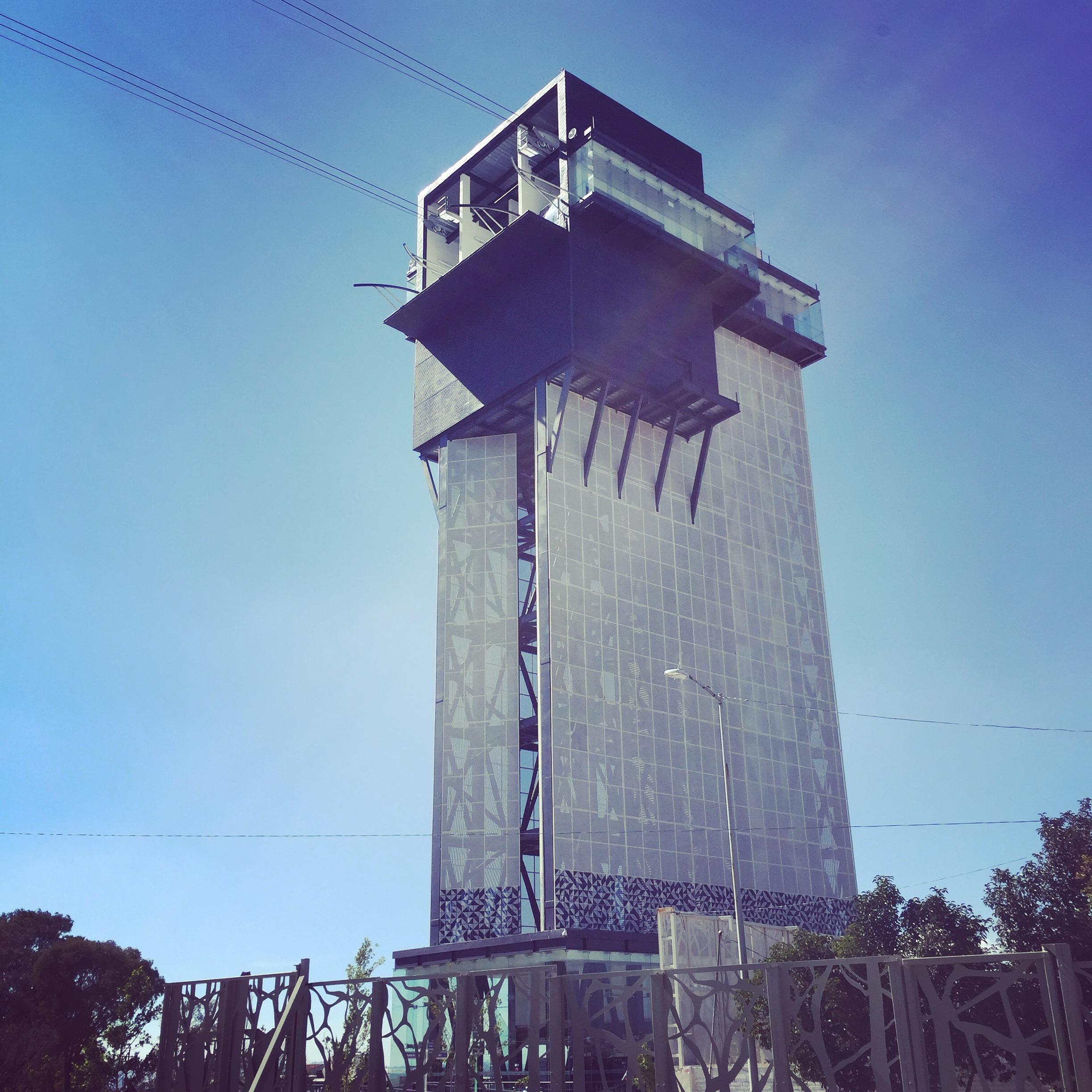 Teleferico de la ciudad de Puebla.